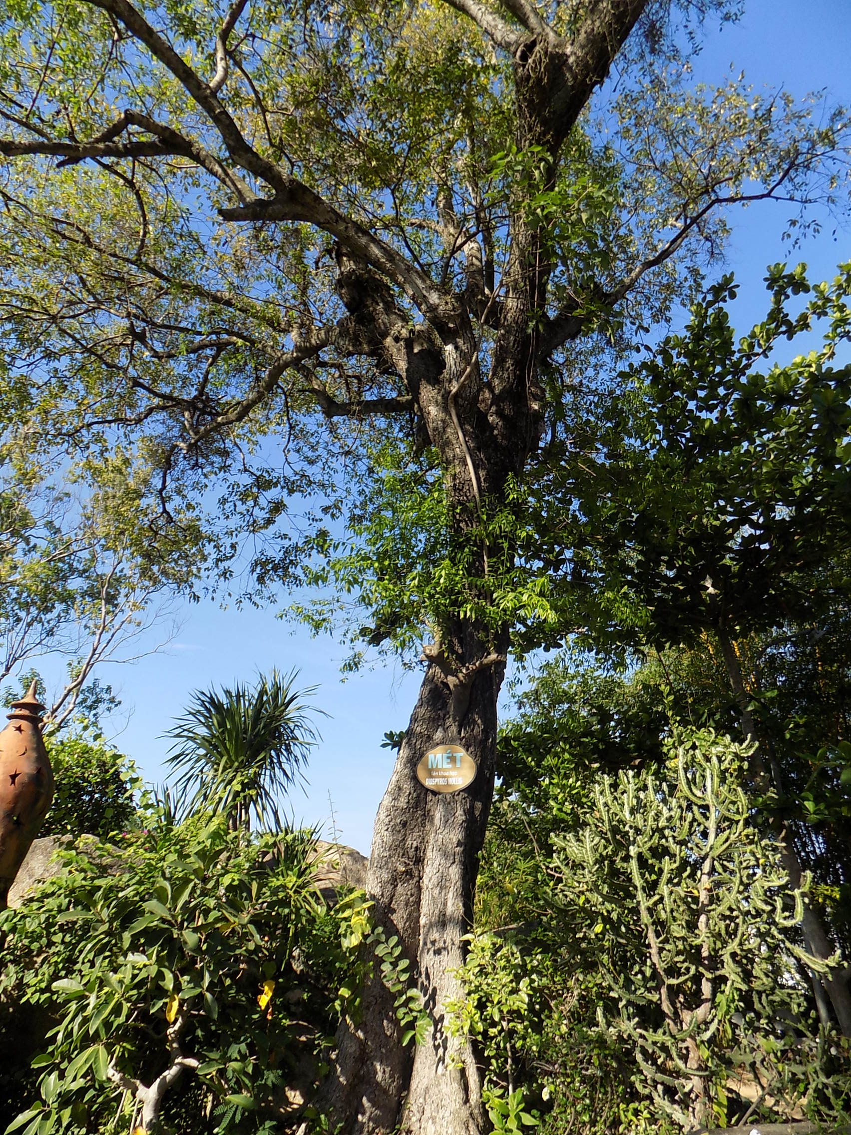 Diospyros mollis à Nha Trang au Vietnam